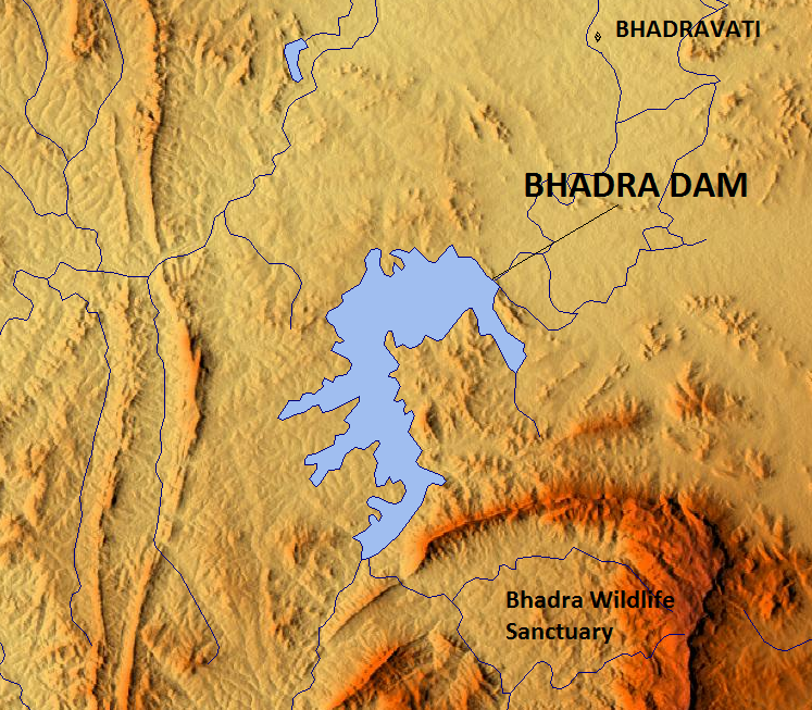 Bhadra Dam, India